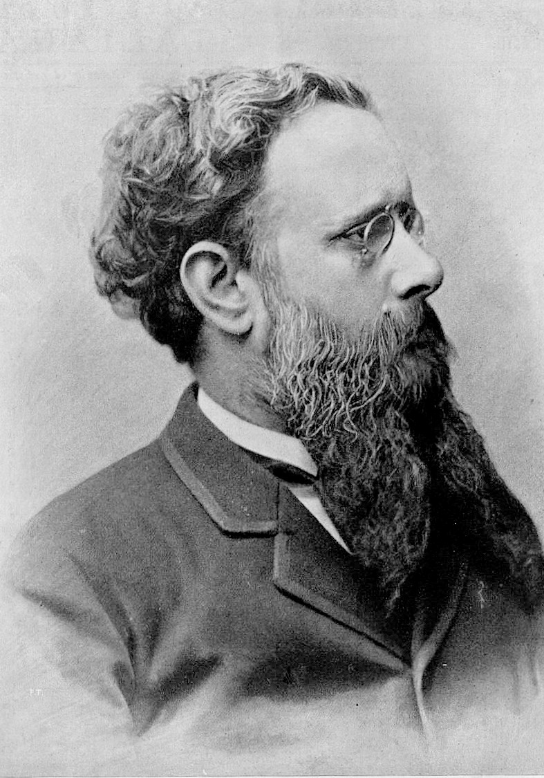 Eugenio Torelli Viollier (1842 - 1900), fondateur du journal italien Corriere della Sera